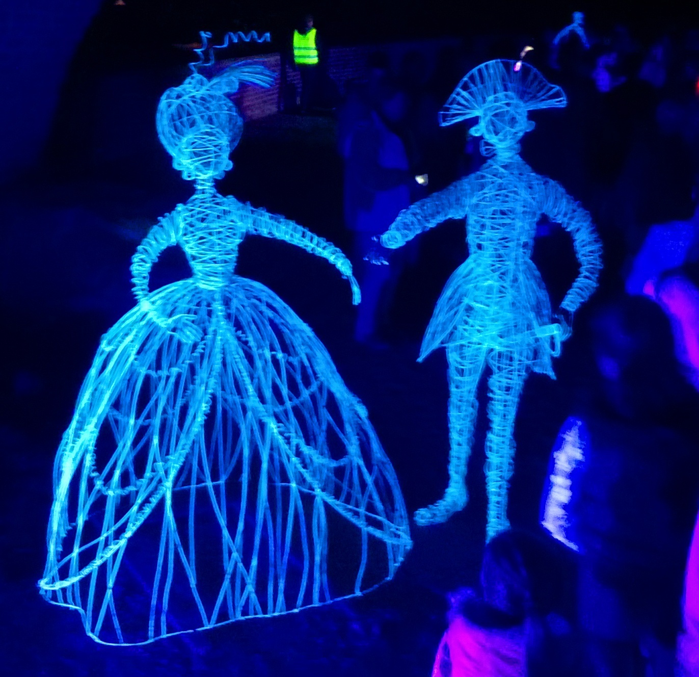 Bella Skyway Festival w Toruniu, instalacja They were here, 2017 rok